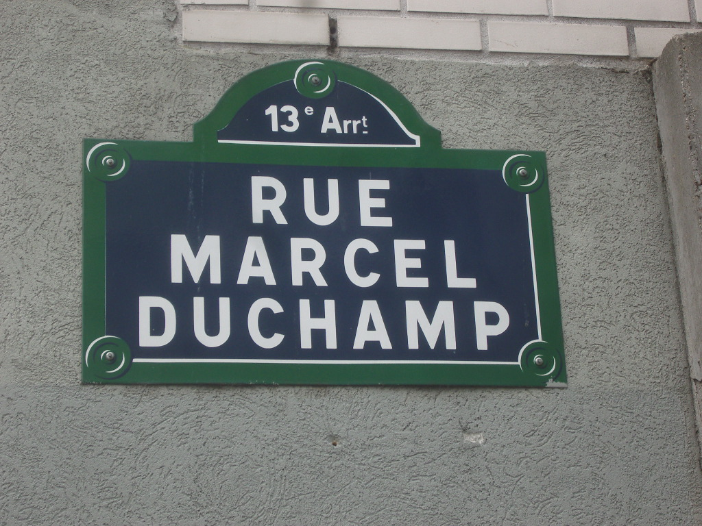 Paris 13e arrondissement - rue Marcel-Duchamp - plaque de rue